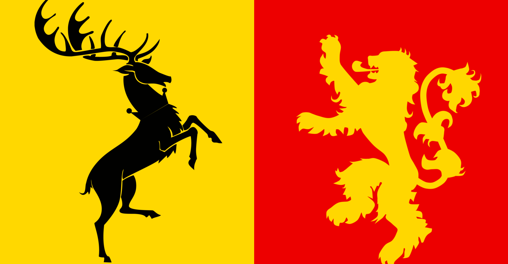 Houses Baratheon-Lannister flag (Joffrey emblem)